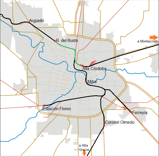 Proyecto del Ferrourbano de Córdoba. En verde, la etapa experimental y en negro los recorridos proyectados.